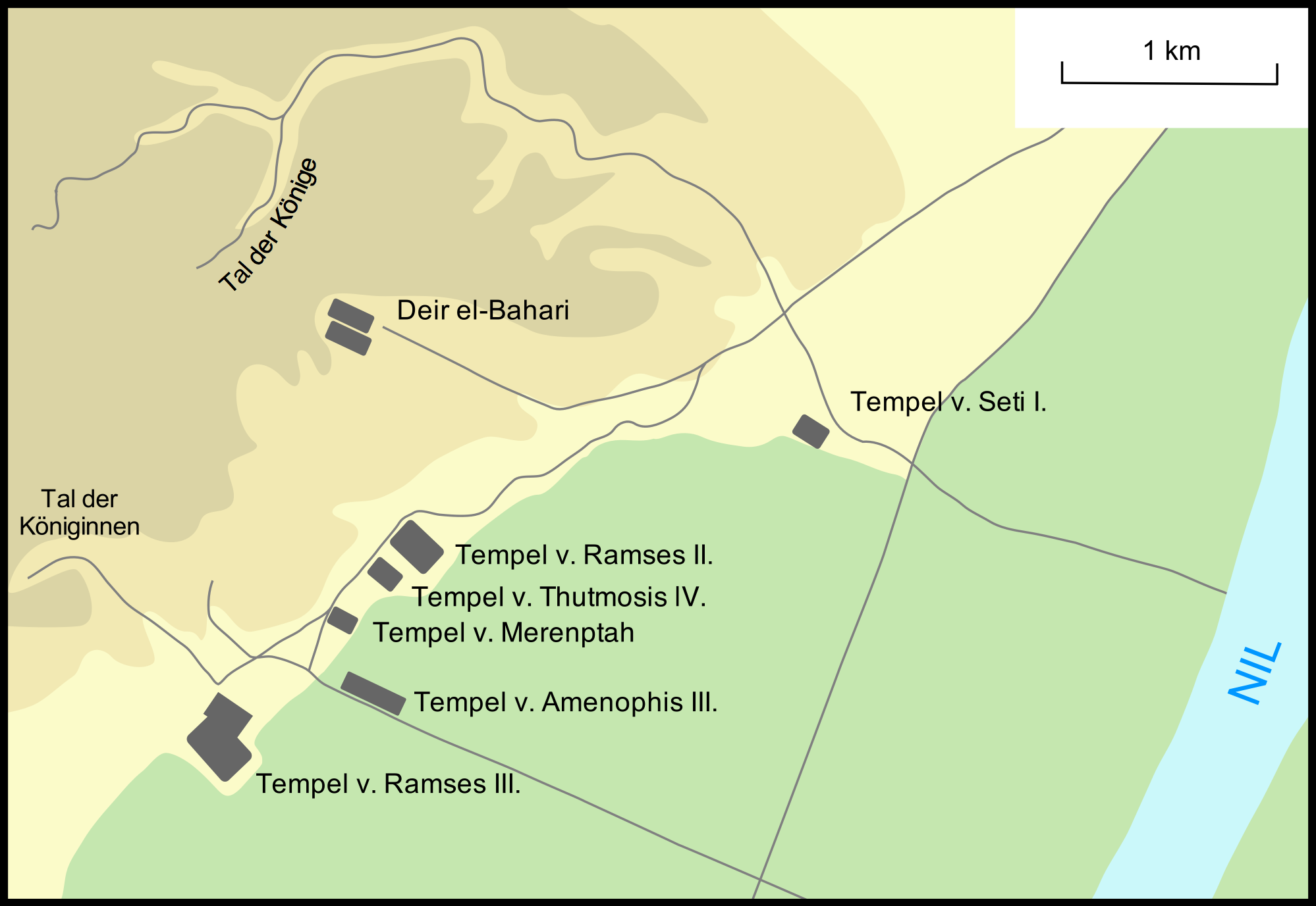 Übersicht der wichtigsten Grabstätten in Theben-West